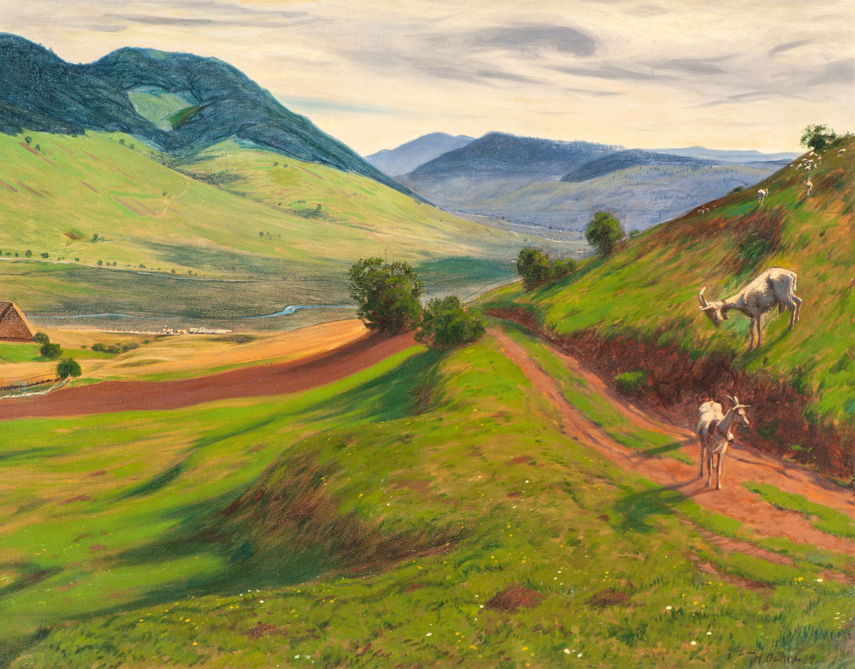 Sommerliche Berglandschaft mit Ziegen. Öl auf Leinwand. Signiert und (19)04 datiert, 70,3 x 90 cm